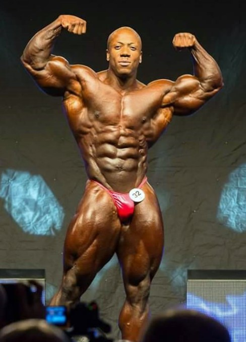 Profi-Bodybuilder Shawn Rhoden